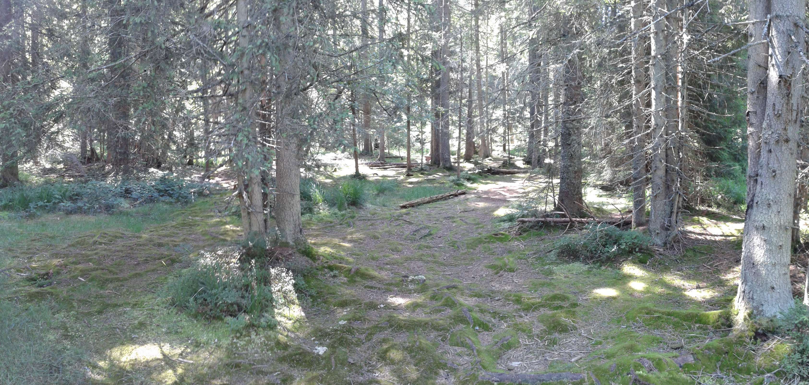 Tepih Livada